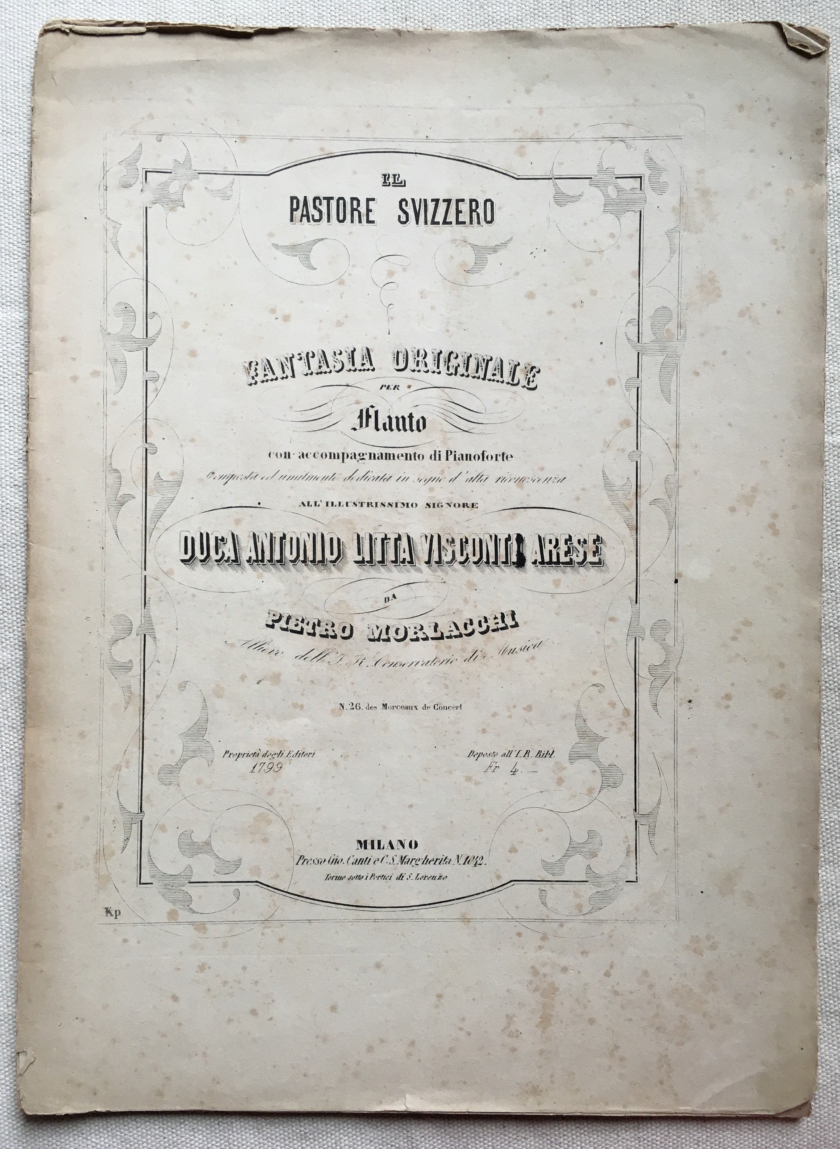 spartito de "Il pastore svizzero" di Pietro Morlacchi